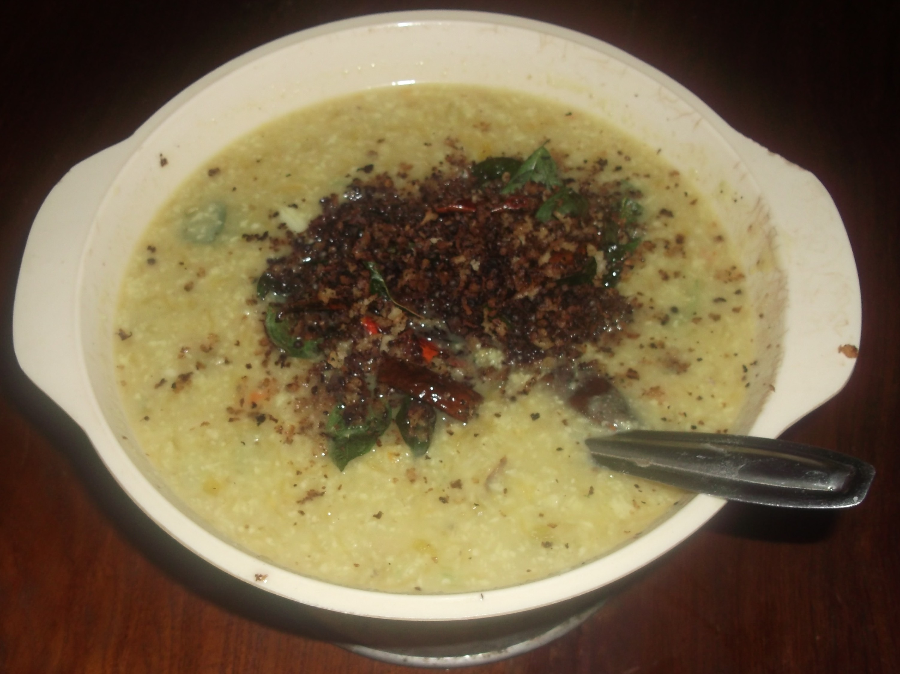 എരിശ്ശേരി, കേരളീയ ഭക്ഷണവിഭവം